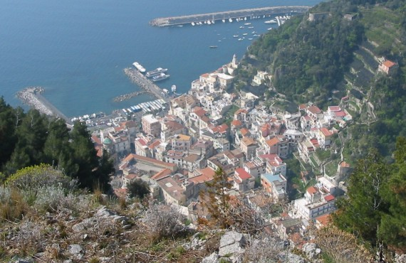 La ville d'Amalfi, province de Salerne, région de Campanie, Italie